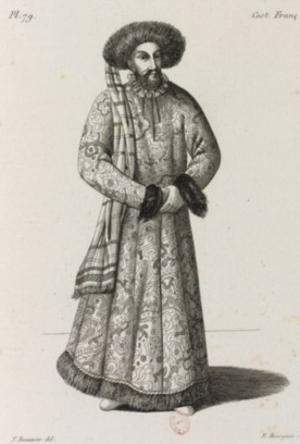 cote cliché : NQ-C-002468 titre de l'original : Alain Fergent, Duc de Bretagne (mort en 1120), d'après un tableau disparu de l'abbaye de Redon département : Histoire, philosophie, sciences de l'homme cote du document : FOL-LI7-8 notice : FRBNF36380913 période du document : XIXème siècle date du document ou du recueil : 1810 partie de : Recueil des costumes français, ou Collection des plus belles statues et figures françaises, des armes... - Paris : Rathier, 1810-1812 folio, pagination : Planche 79 auteur(s) : Beaunier, Firmin Hippolyte (1782-18..) (Dessinateur), Bourgeois, Benjamin Eugène (1791-1818) (Graveur), Rathier, Louis François (1779?-18..) (Auteur) catégorie : Textes imprimés et illustrés